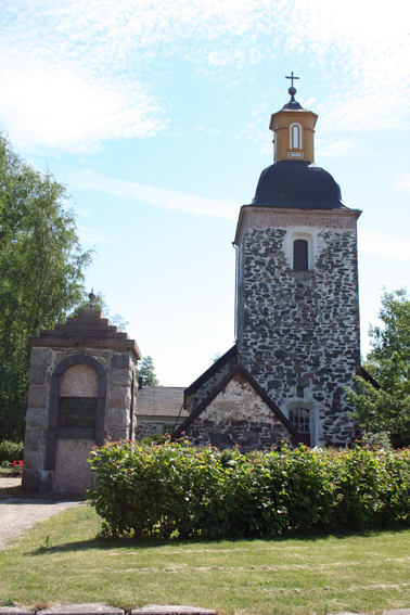 Tammelan kivikirkko